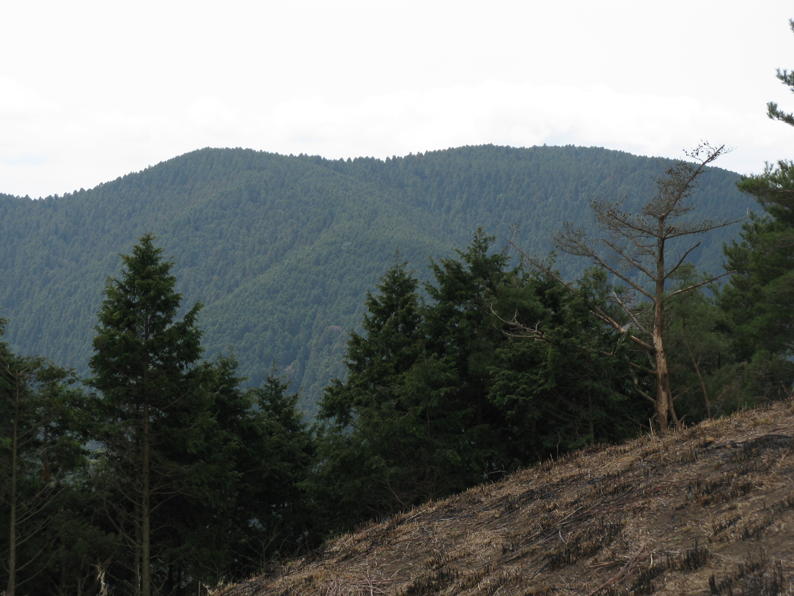 南葛城山 (岩湧山山頂より撮影)